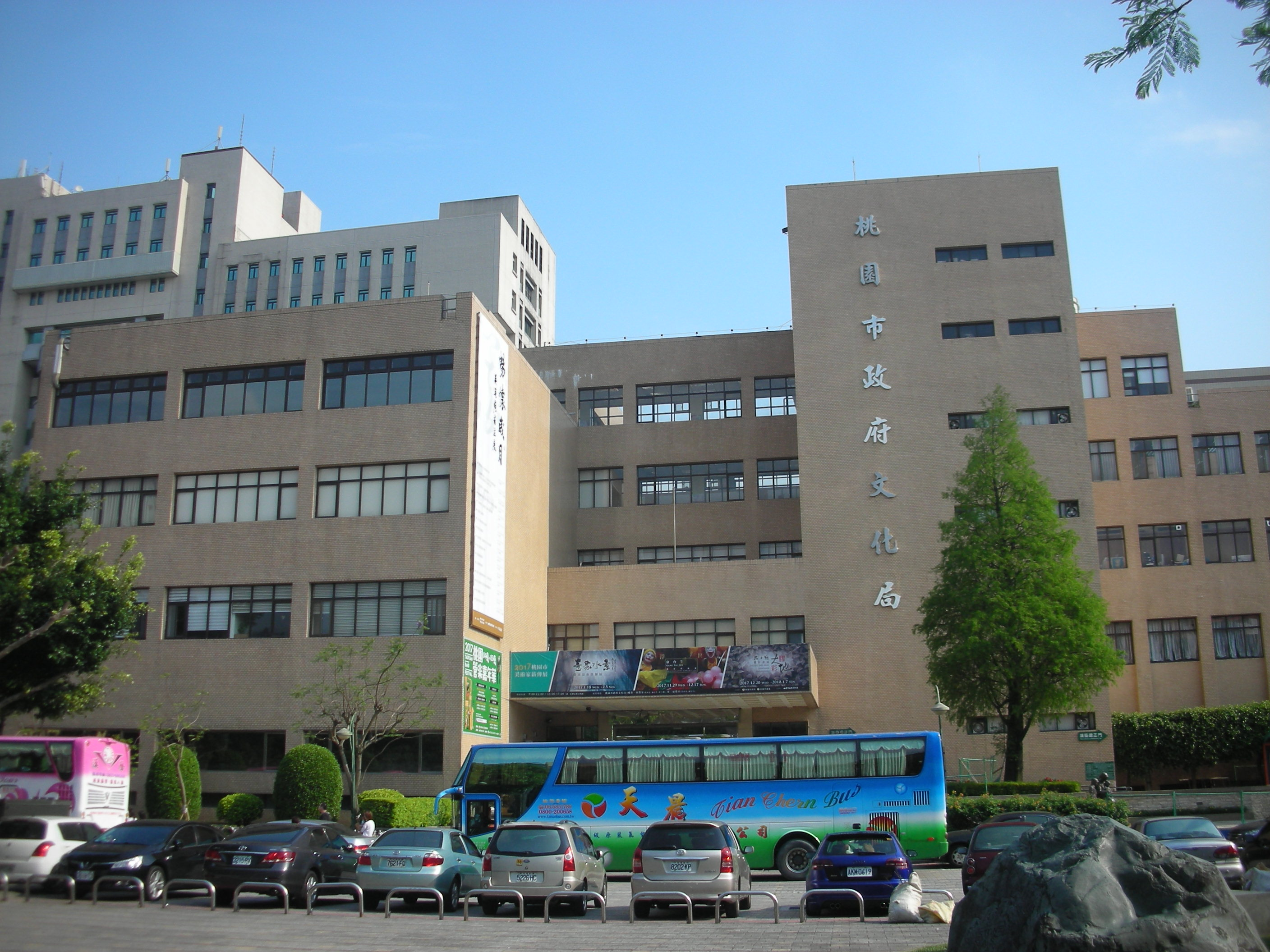 桃園市政府文化局文化大樓，位於桃園市桃園區縣府路。目前同時也作為桃園市立圖書館的總館。